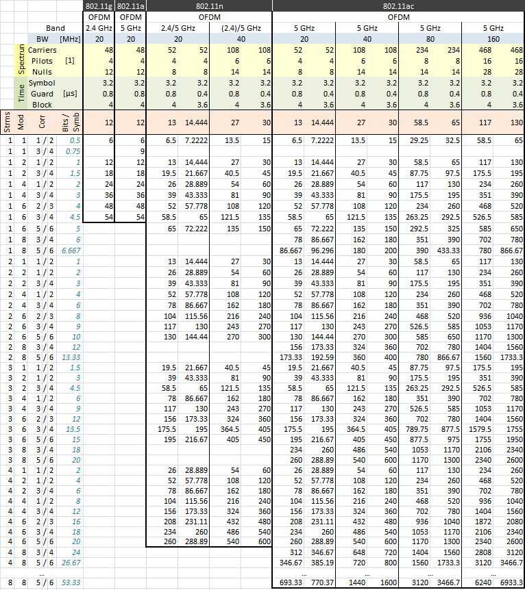 Parameter der Modulationen von 802.11 a/g/n/ac